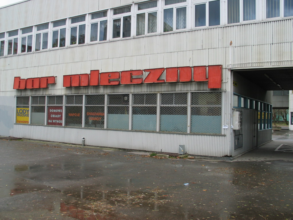 Bar mleczny w Łodzi